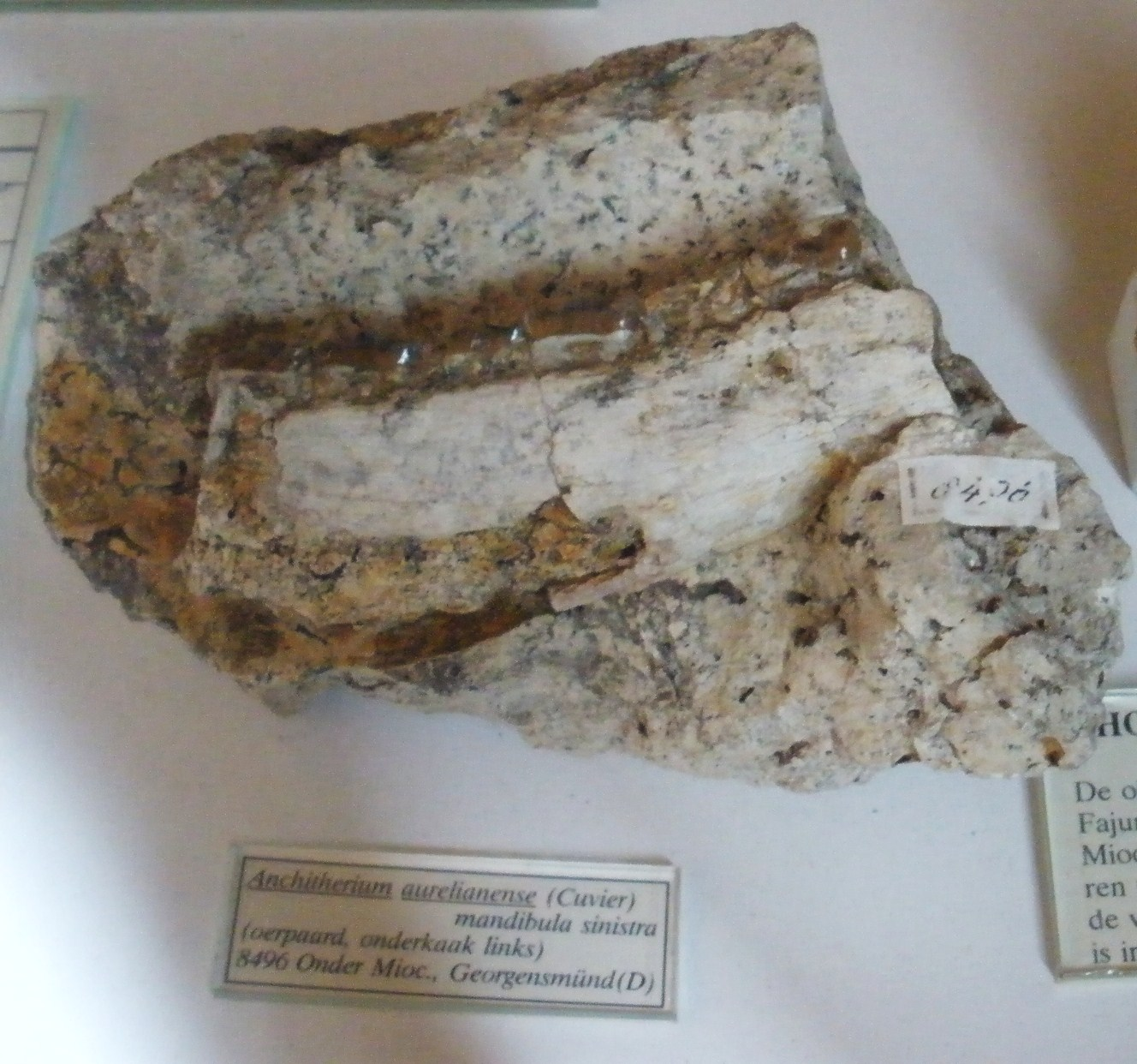 Fossil of Anchitherium, an extinct horse - Took the photo at Teylers Museum, Haarlem